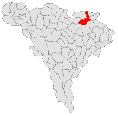 Categorie:Hărţi ale judeţului Alba